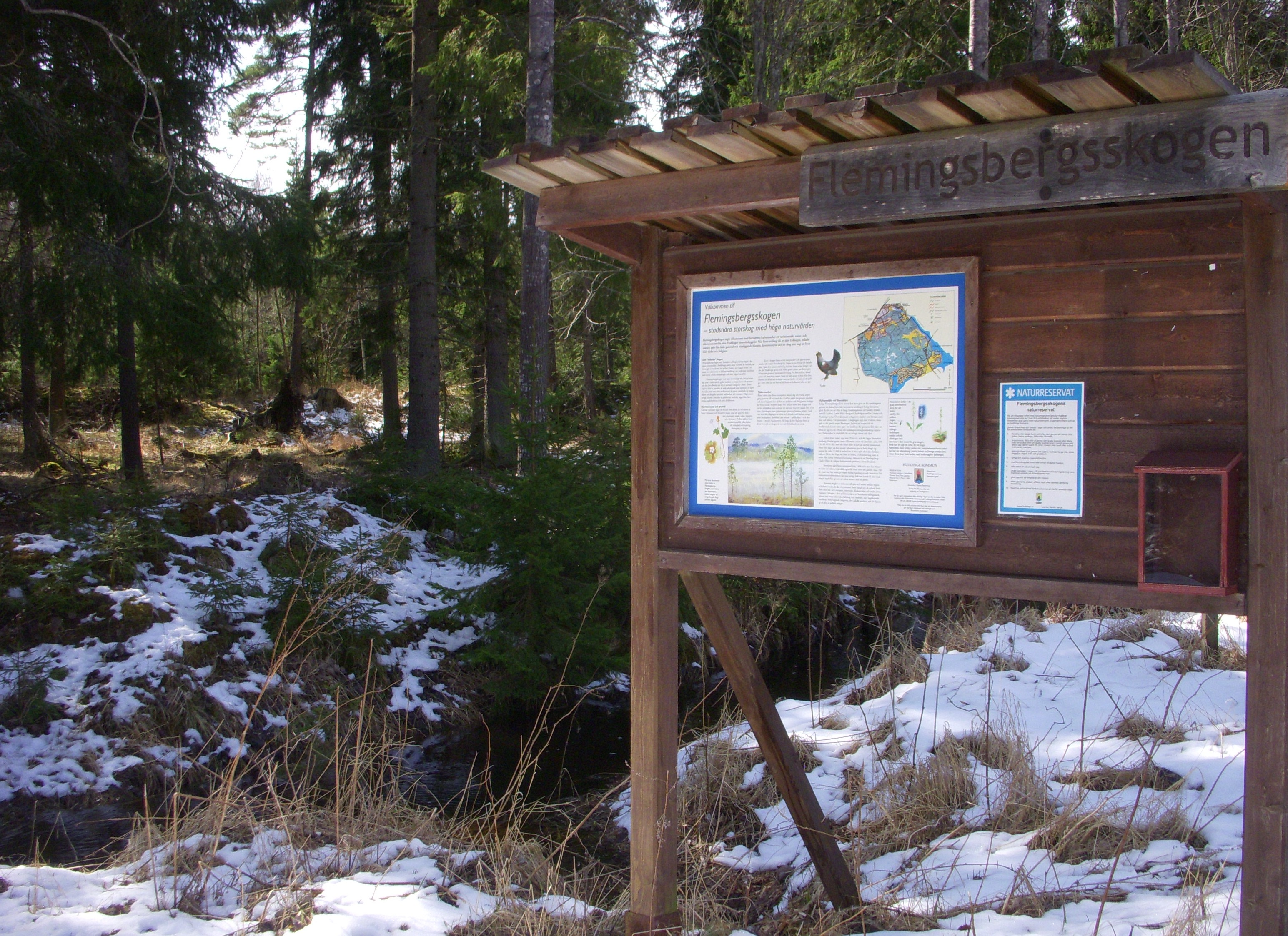 Flemingsbergsskogens naturreservat